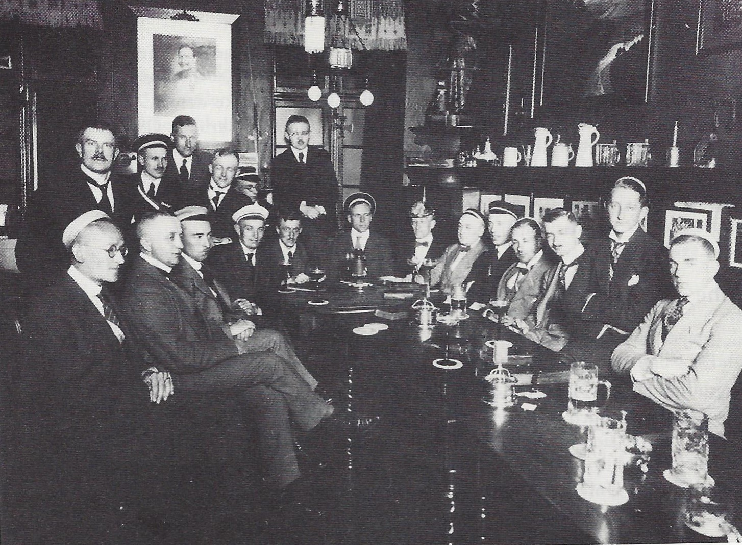 Fotografie der Kösener Inaktivenvereinigung „Die Falle“ in Greifswald